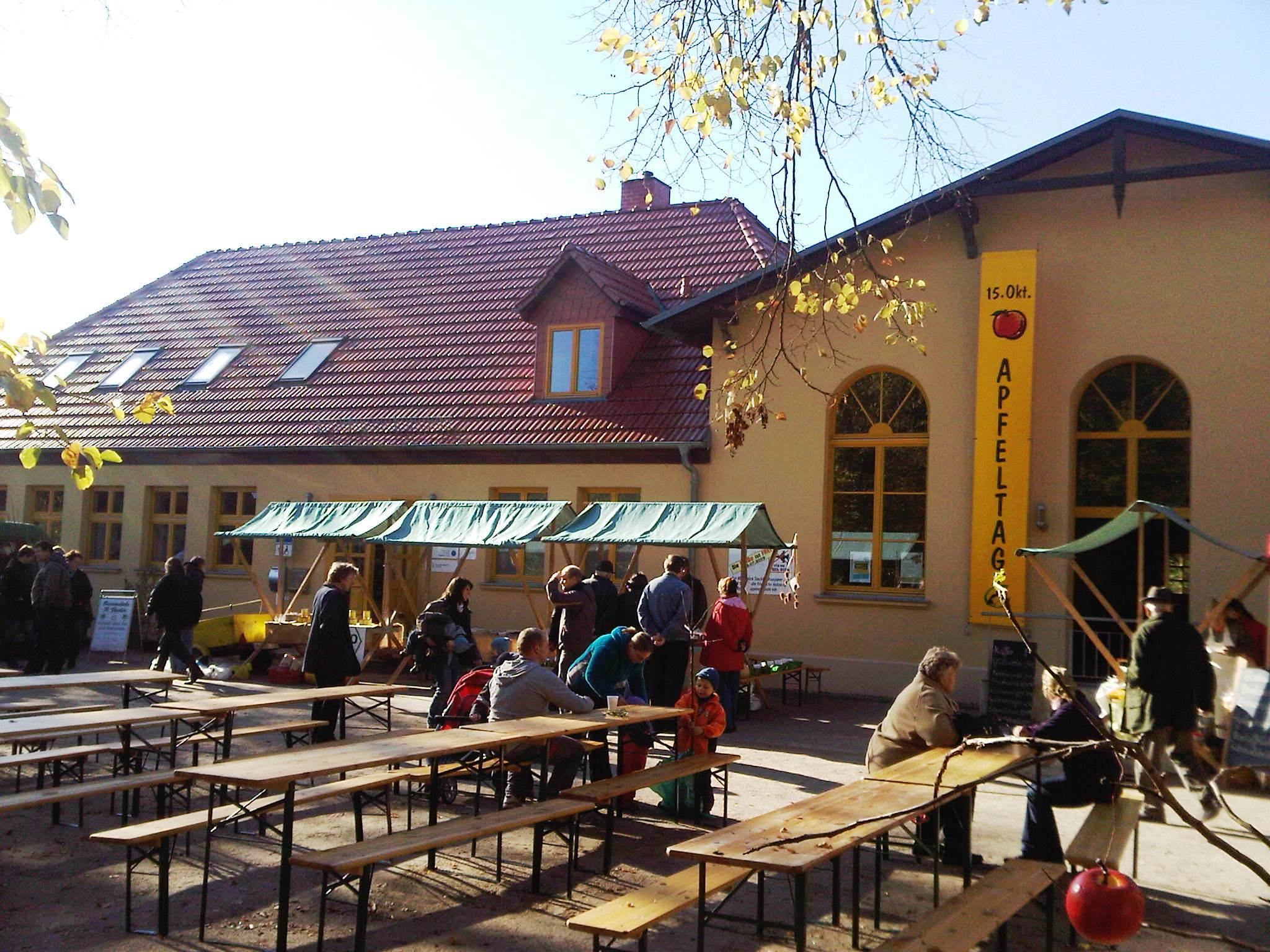 Regionalwerkstatt Stechlin in Menz; aufgenommen am 8. Tag des Apfels